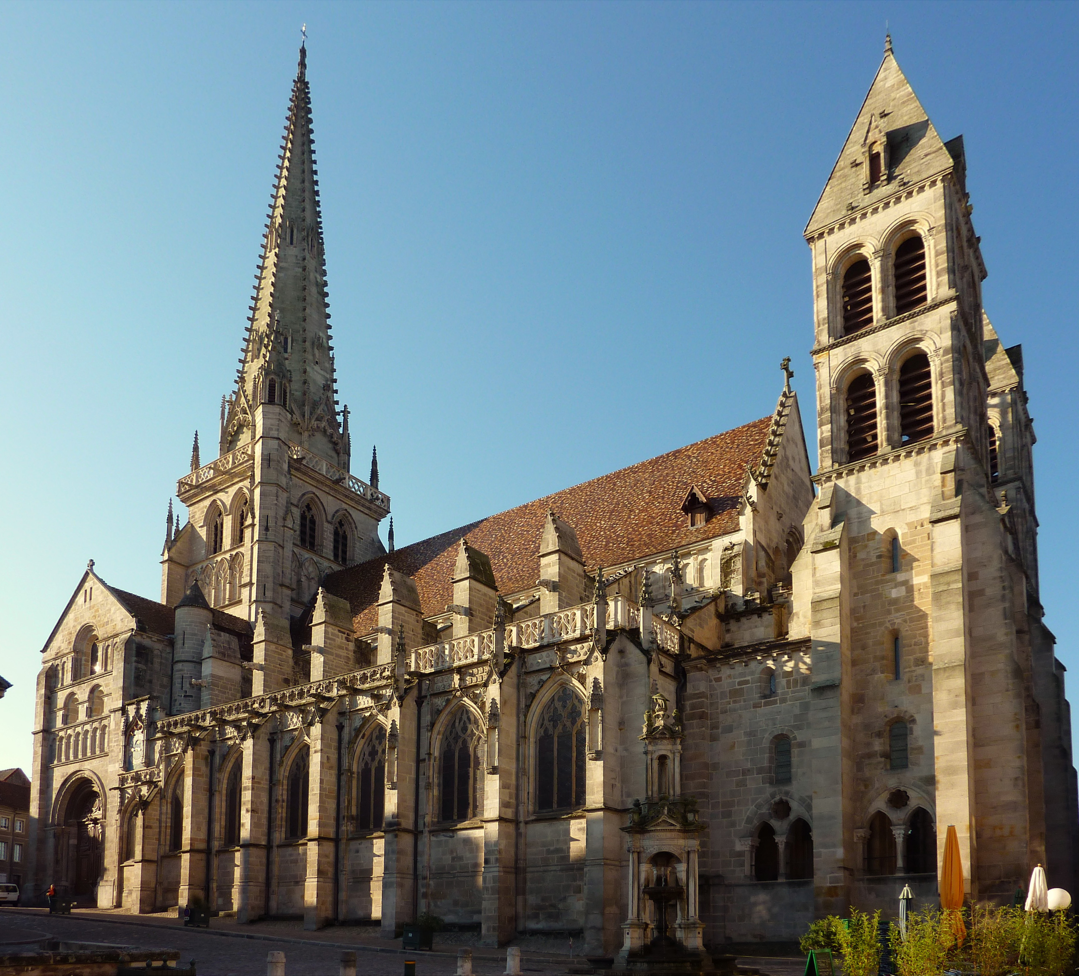 Cathédrale Saint-Lazare d'Autun (Saône-et-Loire, France)